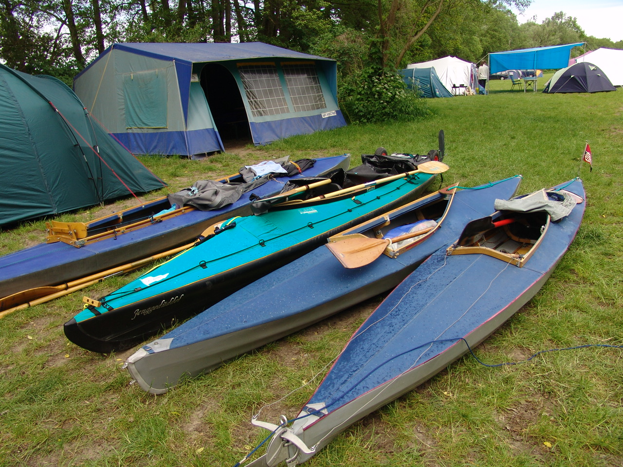 Verschiedene Faltboote, v.l.n.r.: Pouch RZ85, Klepper Aerius 2, Pouch E65, Klepper T6